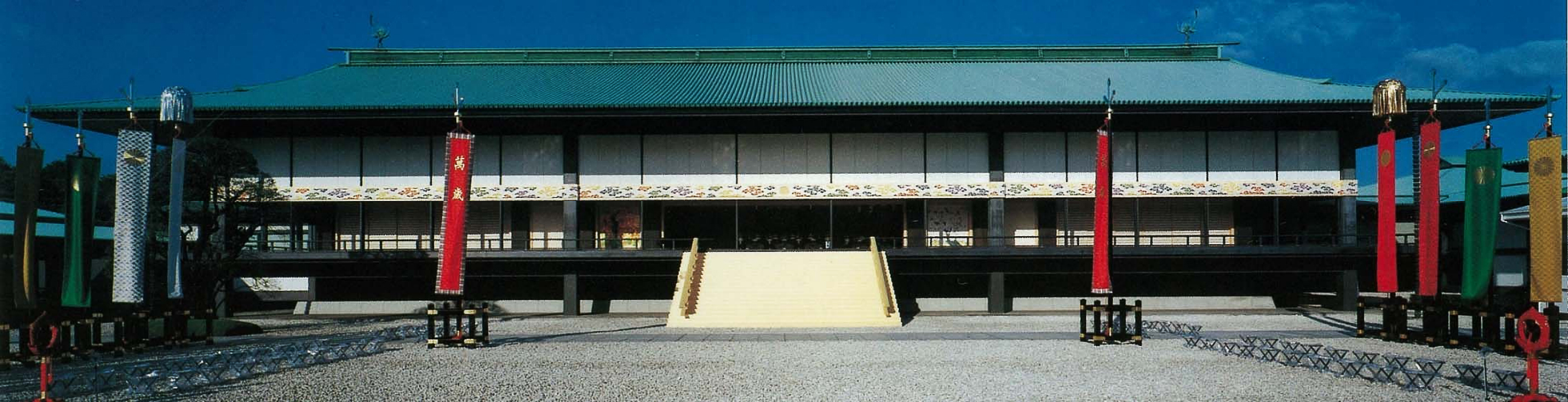 即位礼正殿の儀が行われた皇居正殿